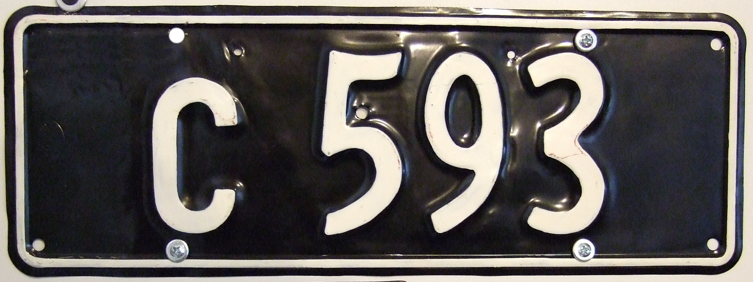 TONGA c.1967 license plate (G)